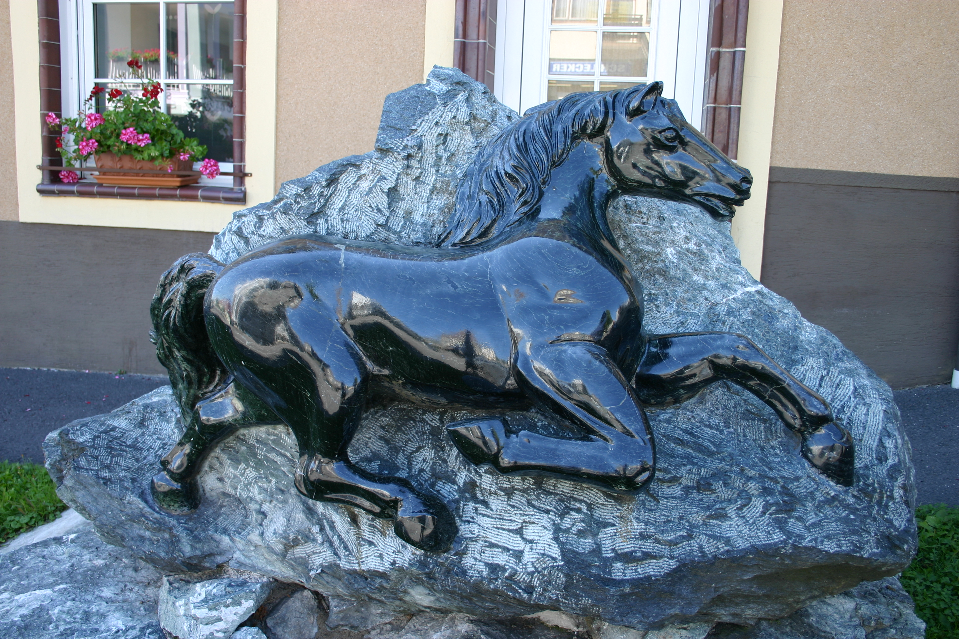 Bernstein im Burgenland Skulptur aus Edelserpentin von Otto Potsch